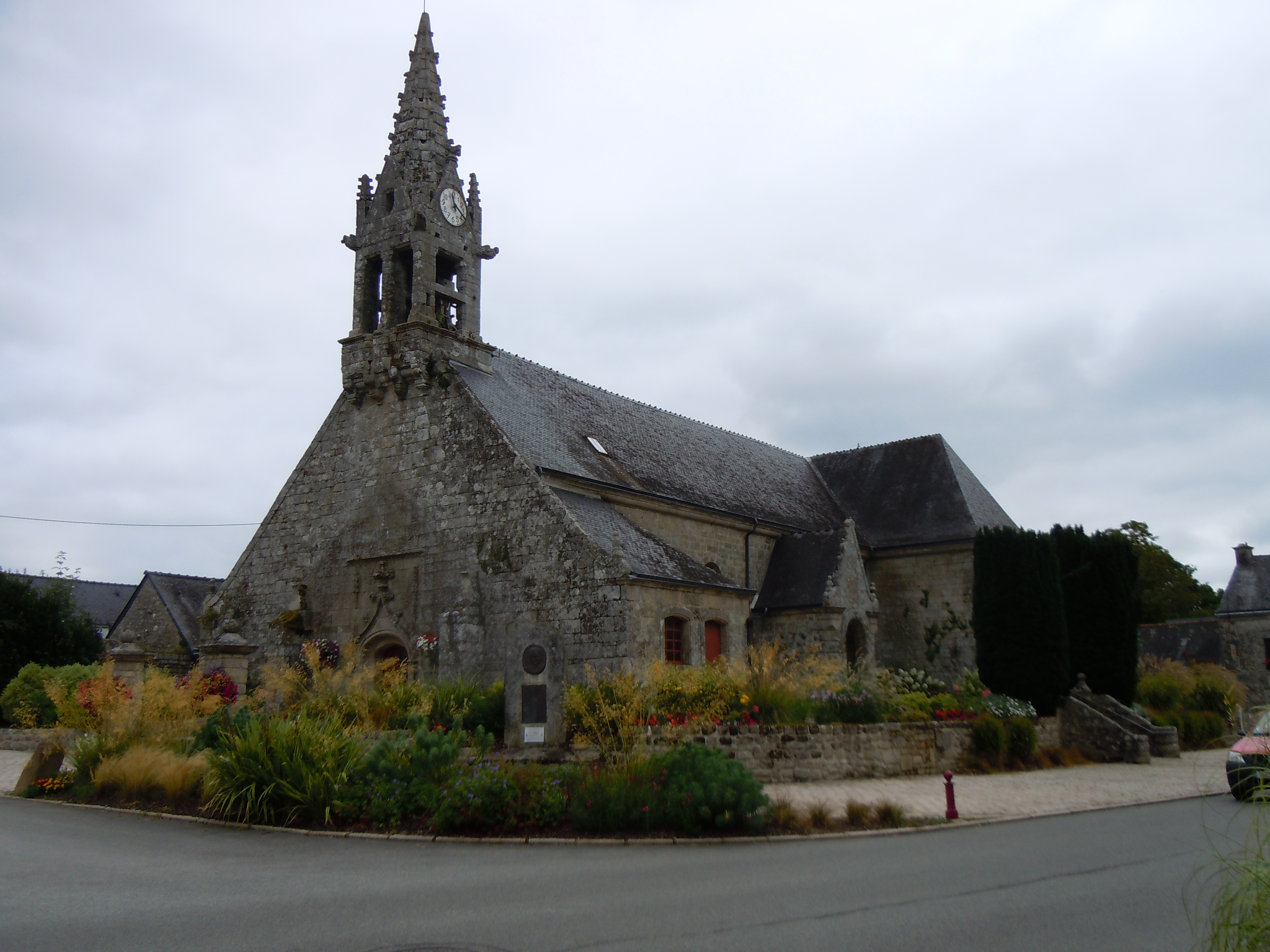 église Saint Brévin, commune de Berné, département du Morbihan, France